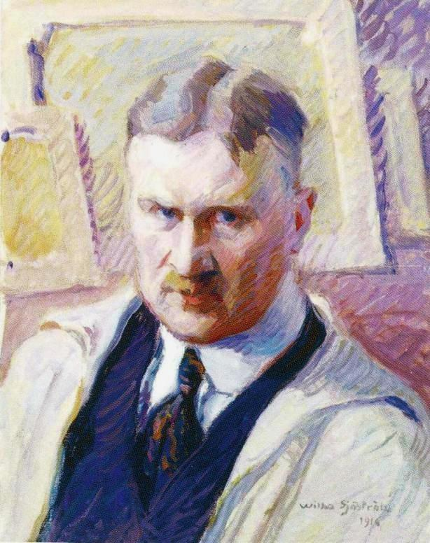 Wilho Sjöströmin omakuva.